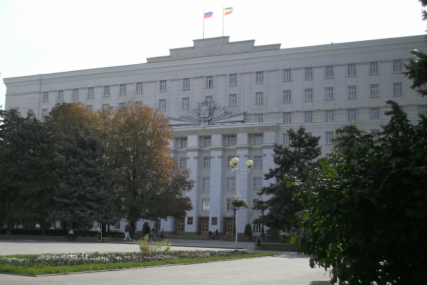 Здание Администрации Ростовской области